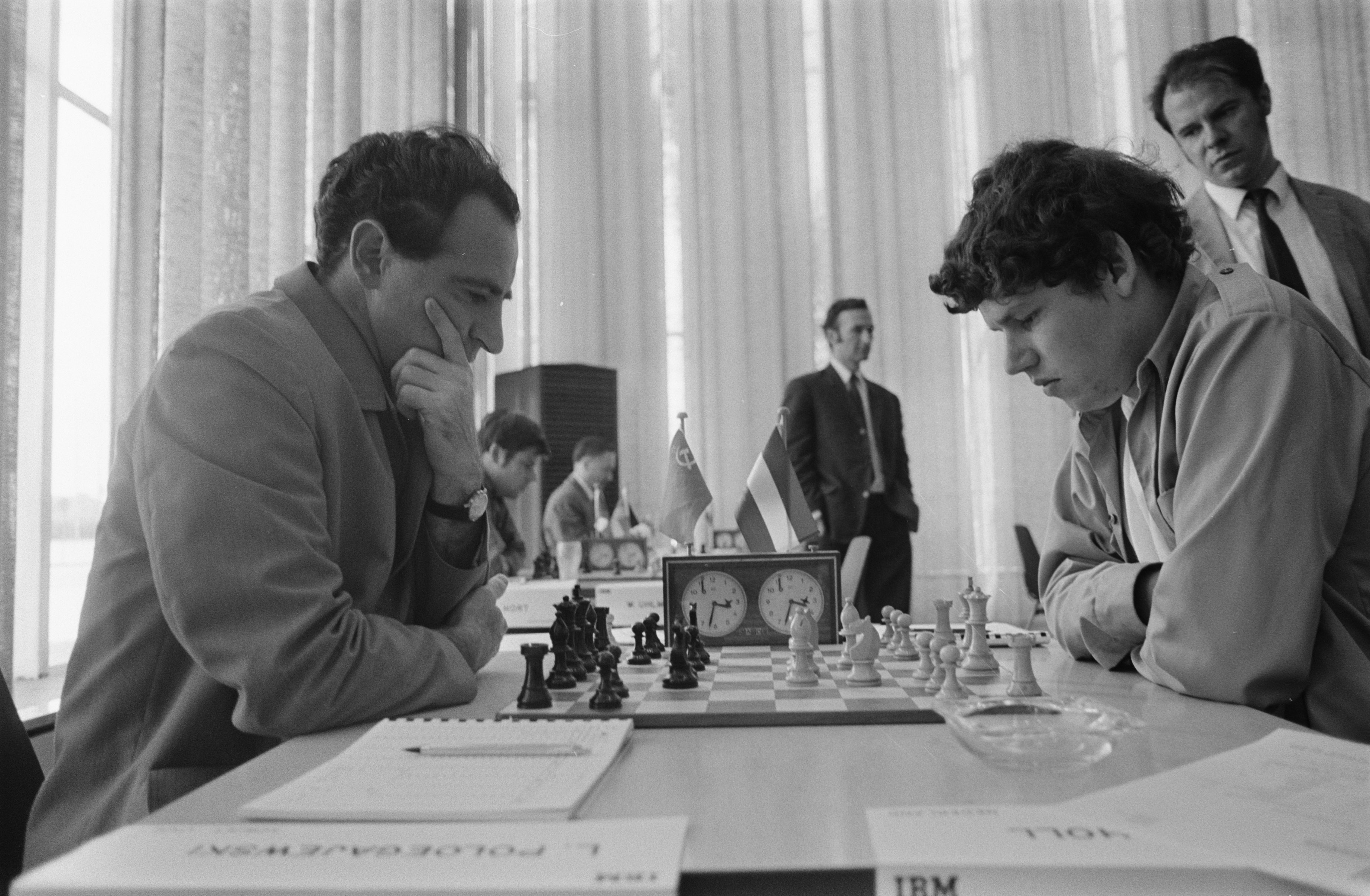 Collectie / Archief : Fotocollectie Anefo Reportage / Serie : [ onbekend ] Beschrijving : IBM-schaaktoernooi Datum : 22 juli 1970 Trefwoorden : schaken Instellingsnaam : IBM-Schaaktoernooi Fotograaf : Mieremet, Rob / Anefo Auteursrechthebbende : Nationaal Archief Materiaalsoort : Negatief (zwart/wit) Nummer archiefinventaris : bekijk toegang 2.24.01.05 Bestanddeelnummer : 923-6896